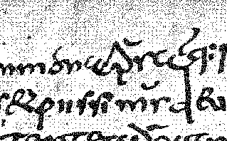 Ace of spades; Steffens Franz; Paléographie latine; Trèves, Paris 1910, Tav. 27d